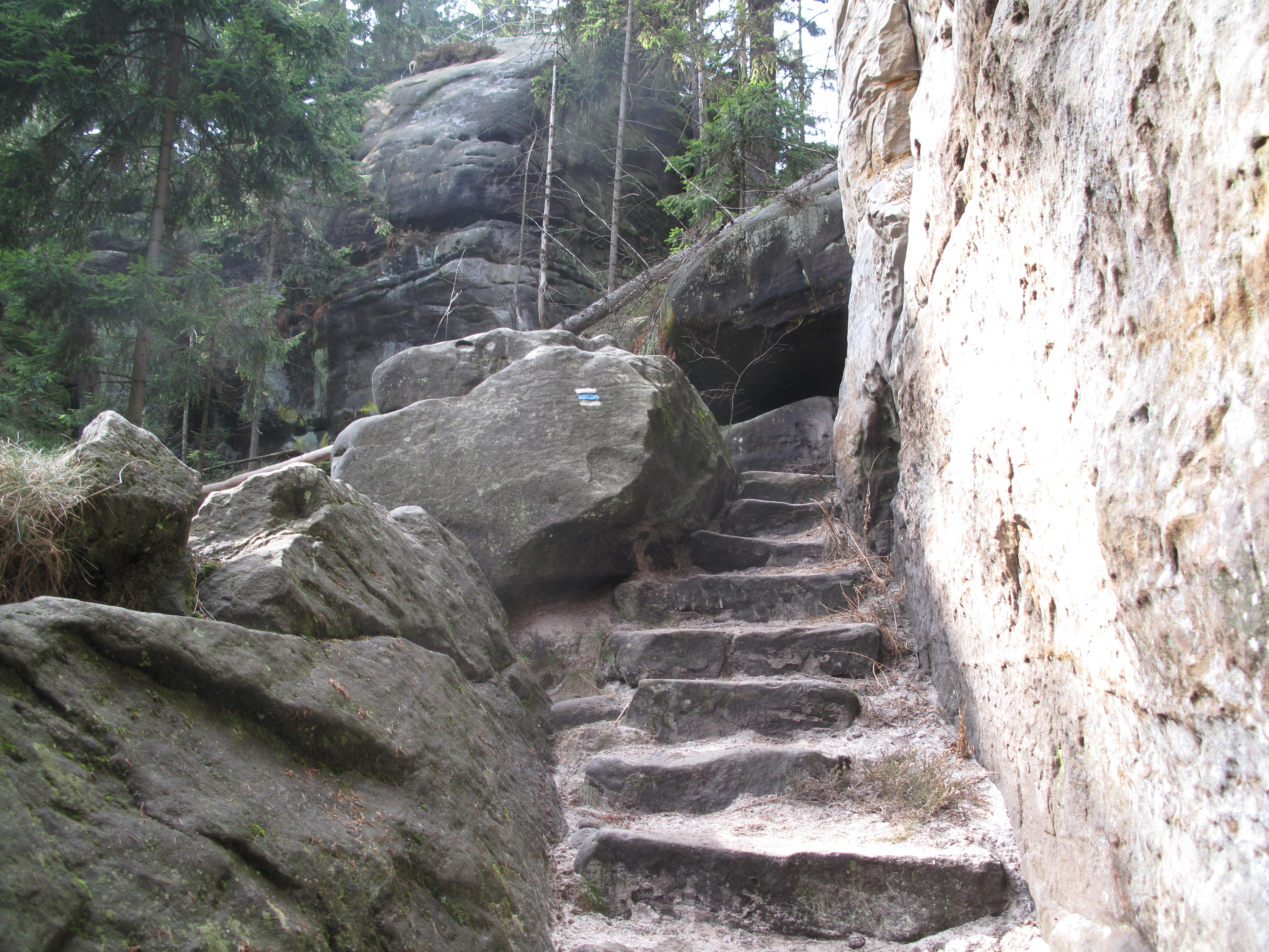 Ostaš